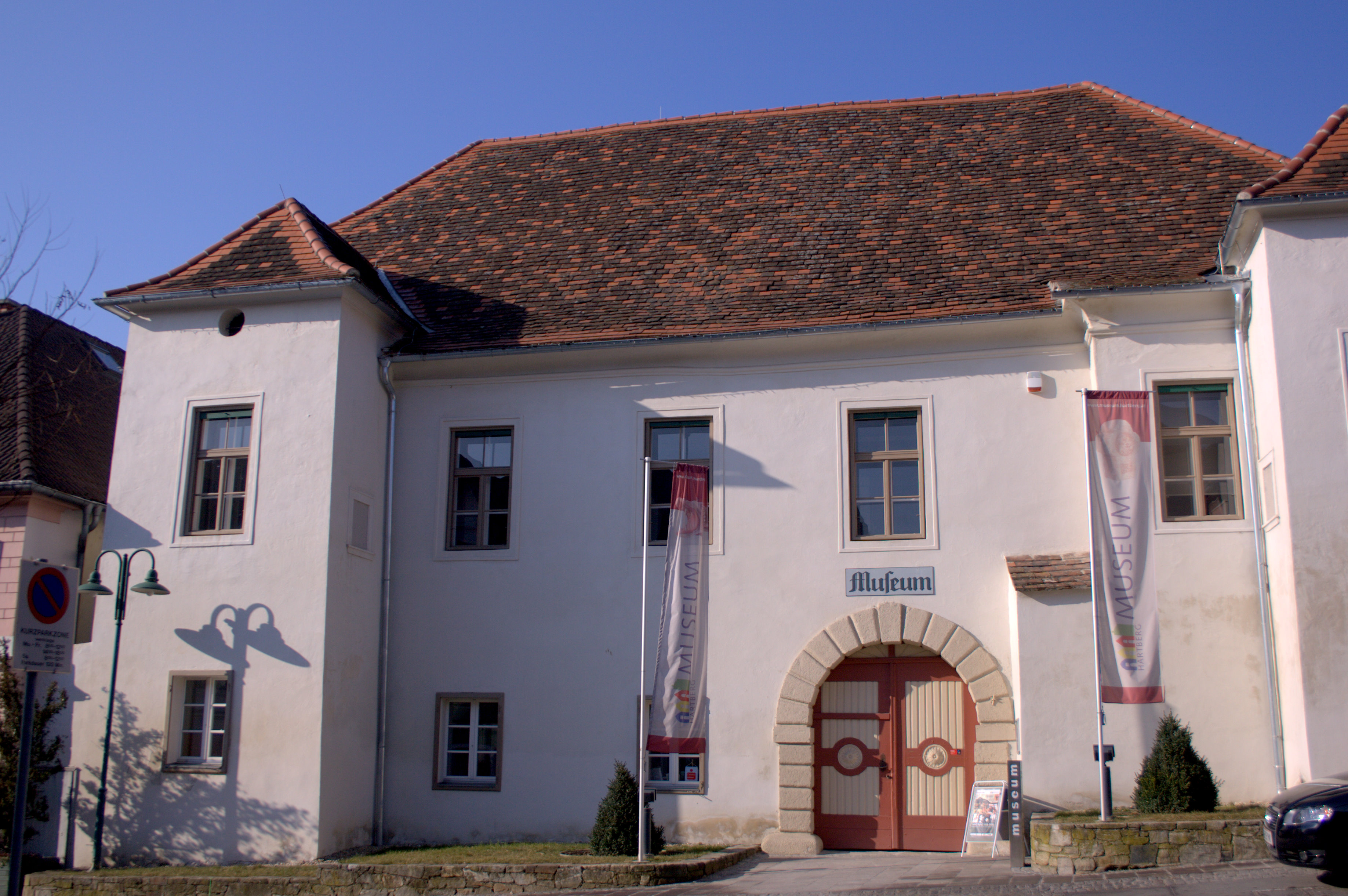 Hartberg Stgeinpeißerhaus, Museum